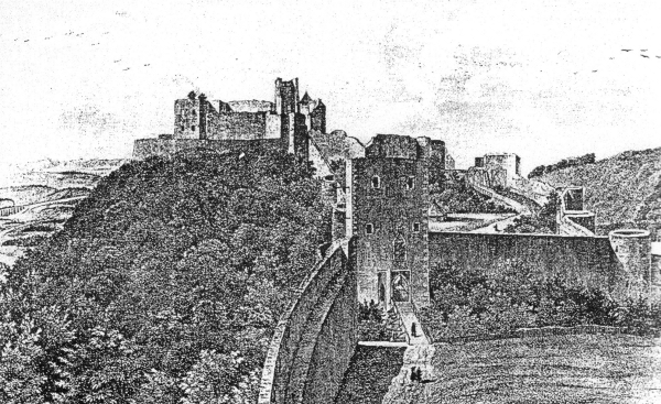 Helfštejn